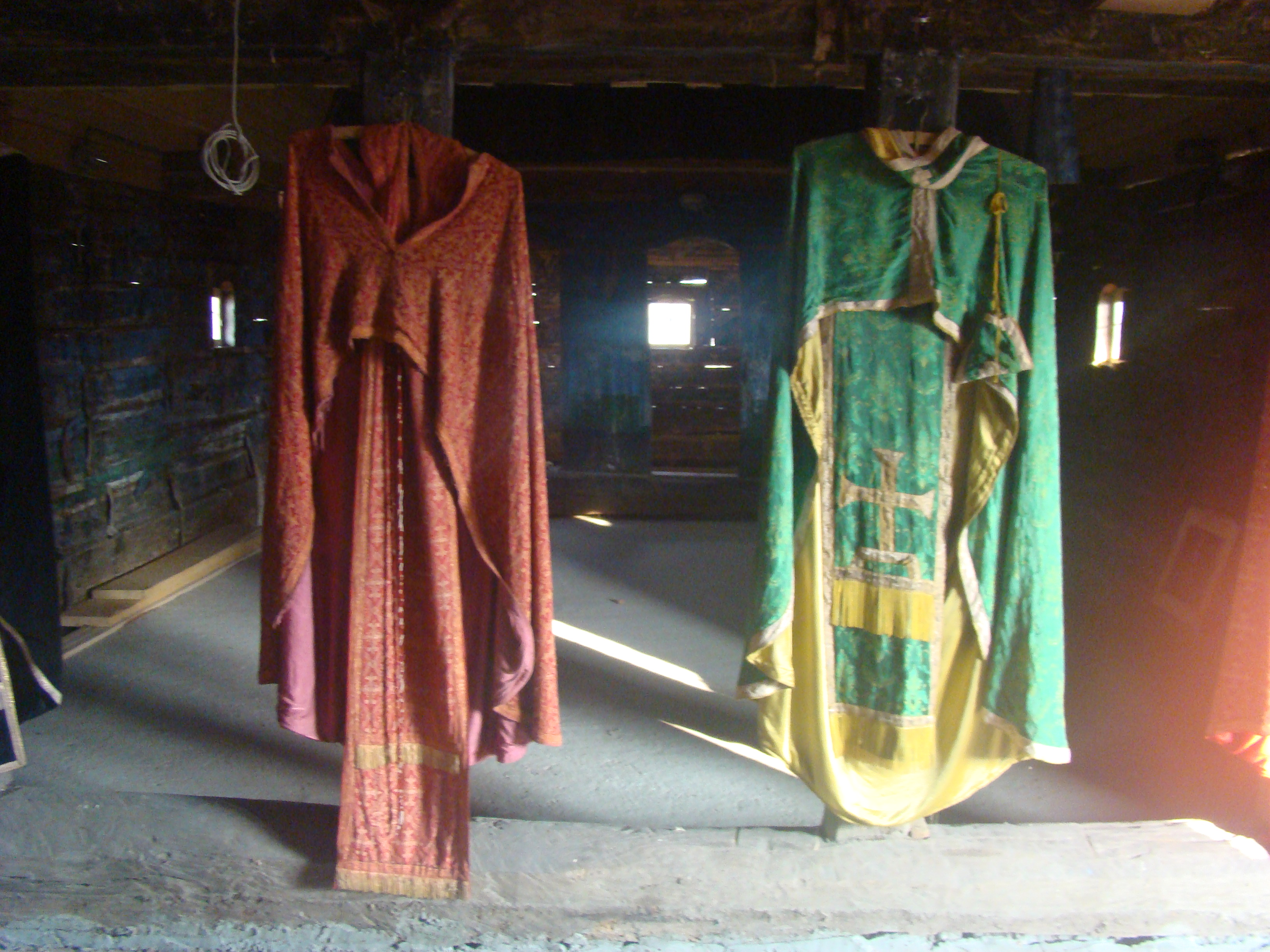 Biserica de lemn "Sfântul Petru" din Mureșenii de Câmpie